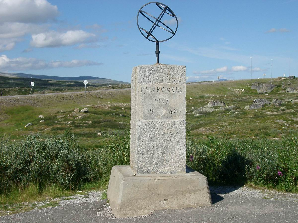 Polarkreis zwischen Narvik & Mo i Rana Norwegen. Die Eintragung der zweiten Jahreszahl "1940" erfolgte im zweiten Weltkrieg unter deutscher Besatzung; zwischen den Zahlen "19" und "40" befand sich mit größter Wahrscheinlichkeit ein Hakenkreuz, das später nur ausgekratzt wurde.